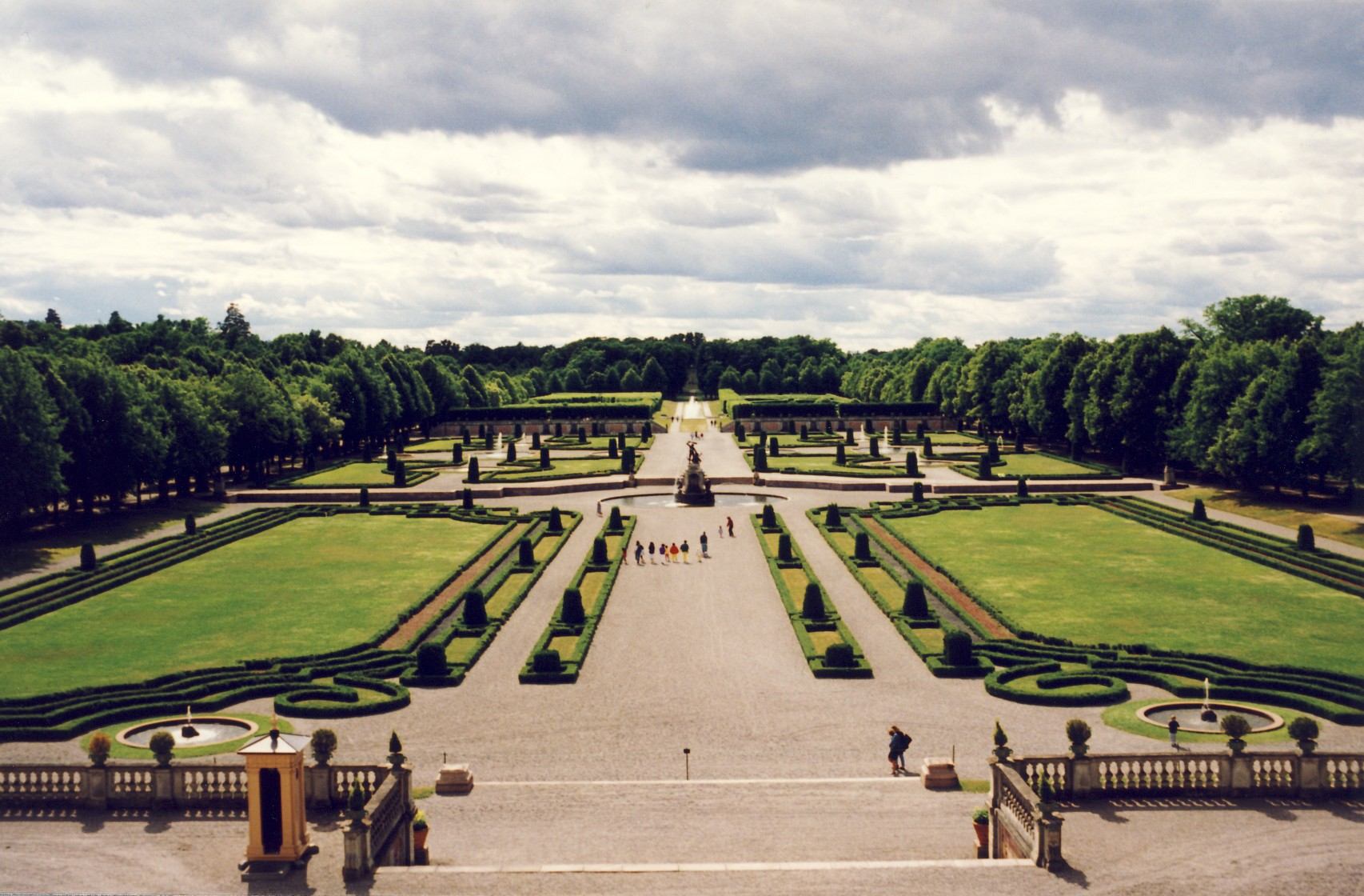 Barockparken vid Drottningholms slott